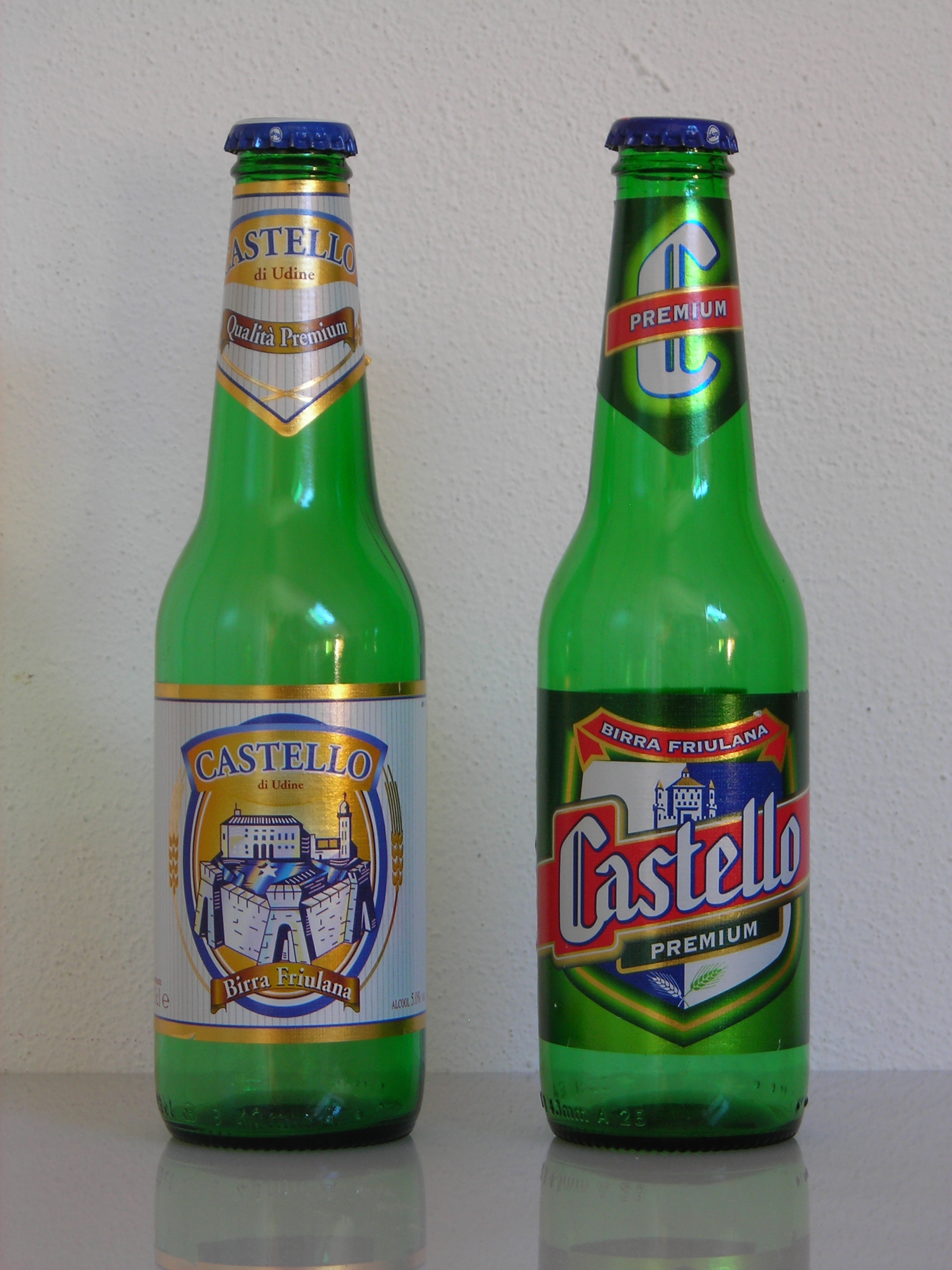 Bottiglie di birra Castello.